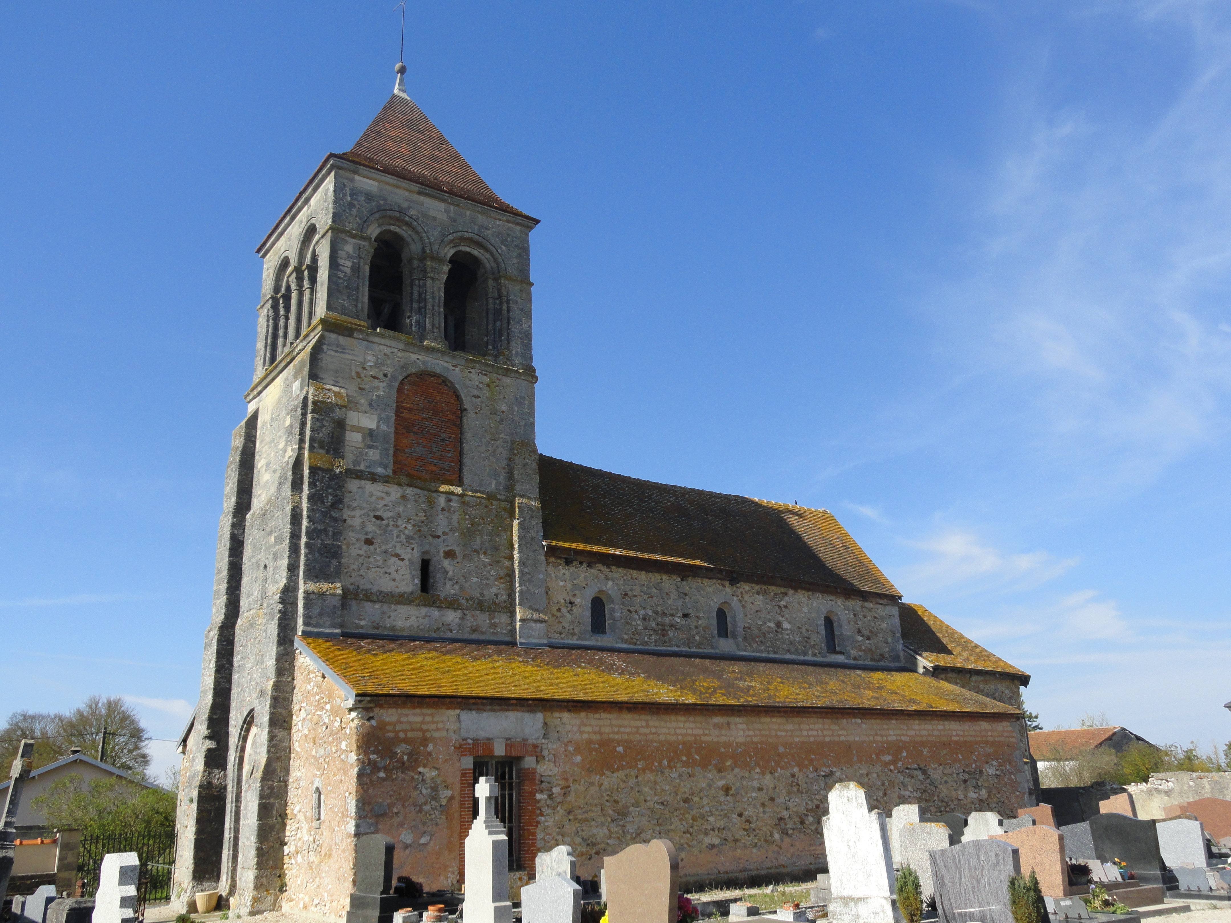 Côté sud de l'église Saint-Thibault de Flavigny (51) et son cimetière.